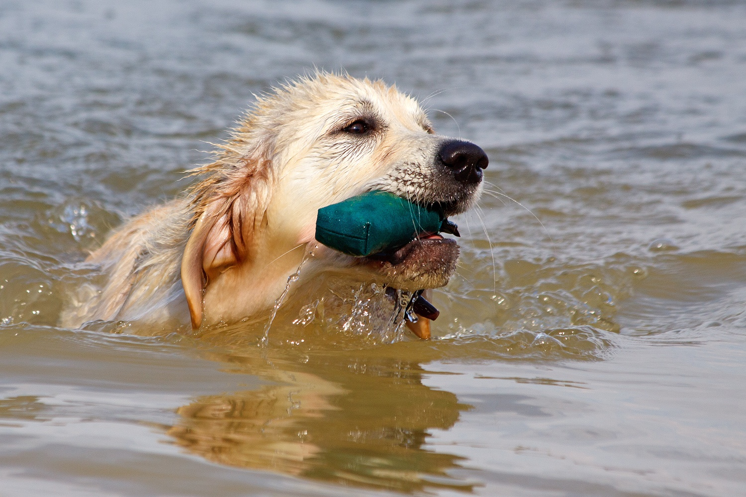 Möhnesee, Südufer, NRW, Deutschland, Datum/Uhrzeit: 03.10.2011 11:49:00